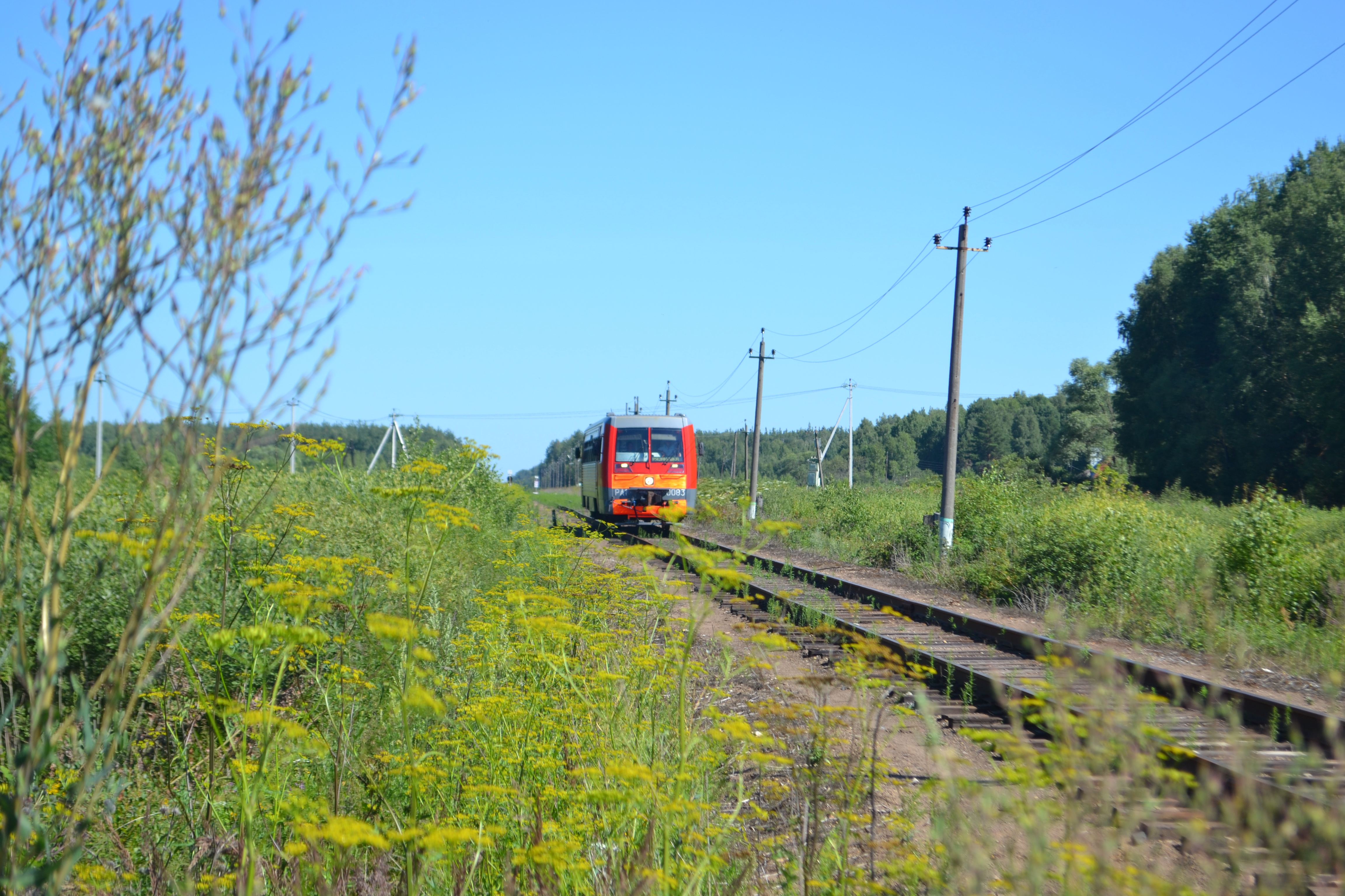 Железнодорожная ветка Кривандино-Рязановка близ Середниково (Шатурский район)